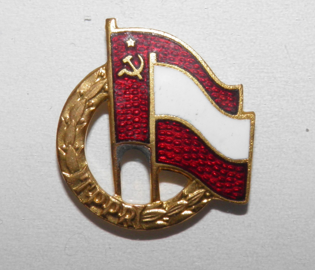 Odznaka Towarzystwa Przyjaźni Polsko-Radzieckiej